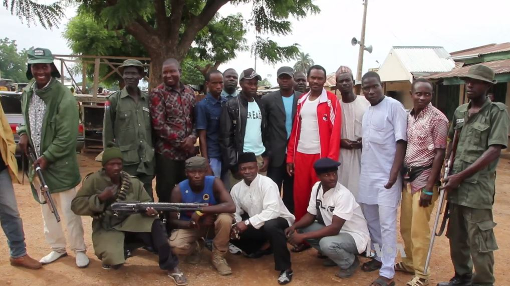 Membres des milices d'autodéfense CJTF à Michika, le 14 juin 2016.